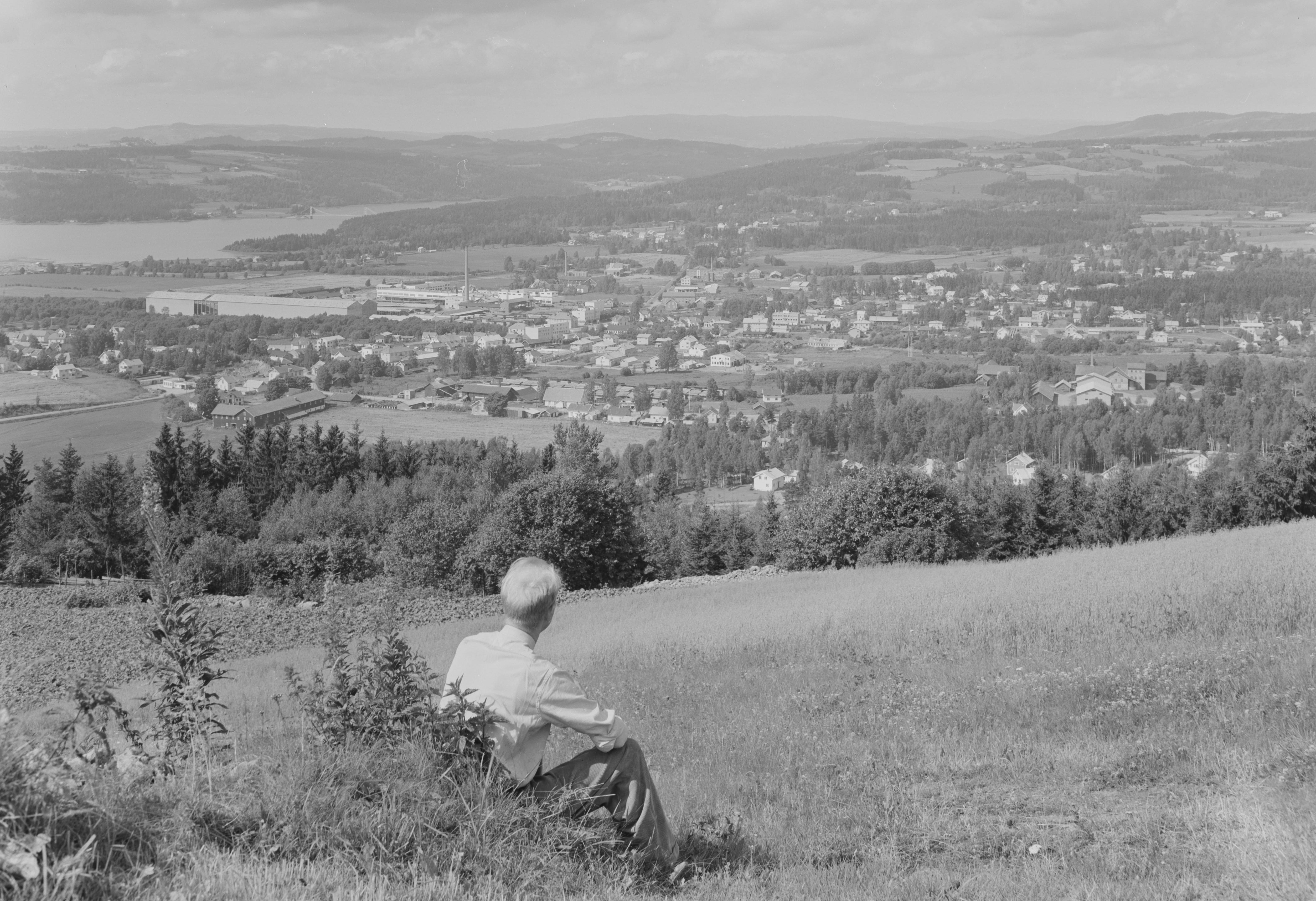 Bildet er hentet fra Nasjonalbibliotekets bildesamling Brumunddal,Furnesfjorden, Ringsaker, Hedmark